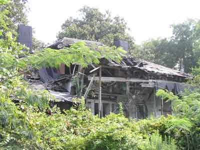 Coker House på slagmarken ved Champion Hill, Mississippi, billede fra 2005.